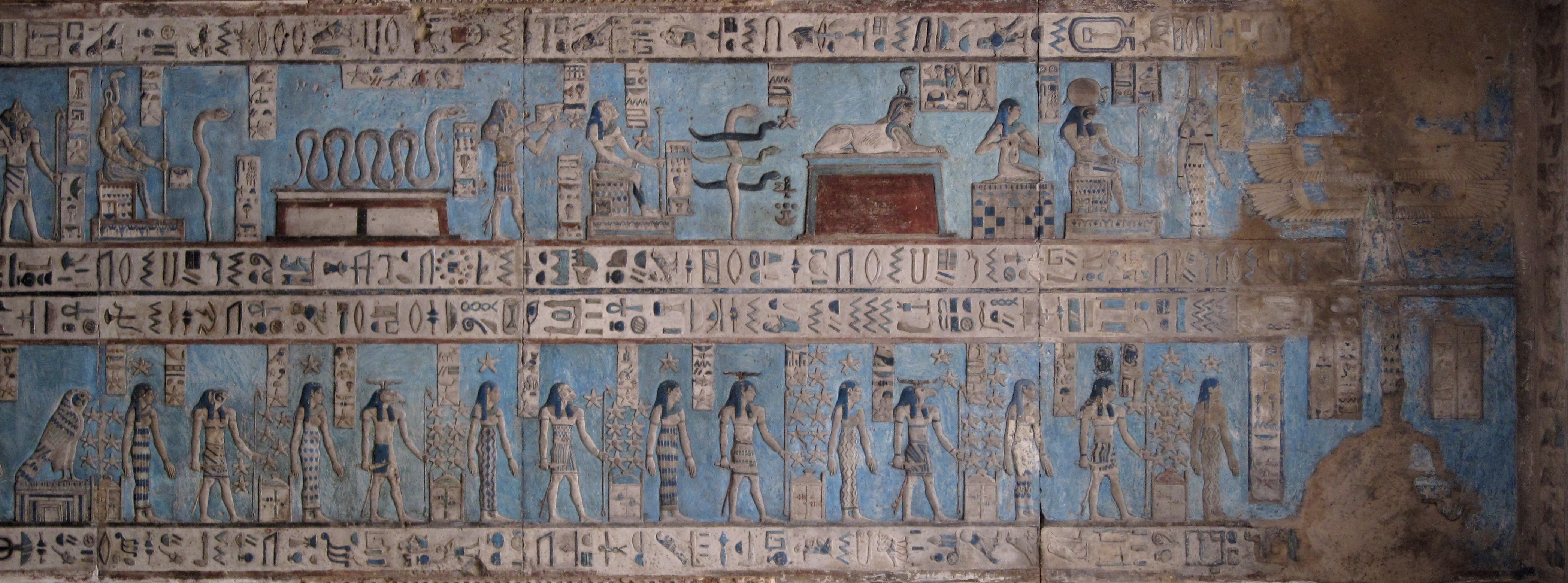 Deckenrelief im Tempel von Dendera, Ägypten